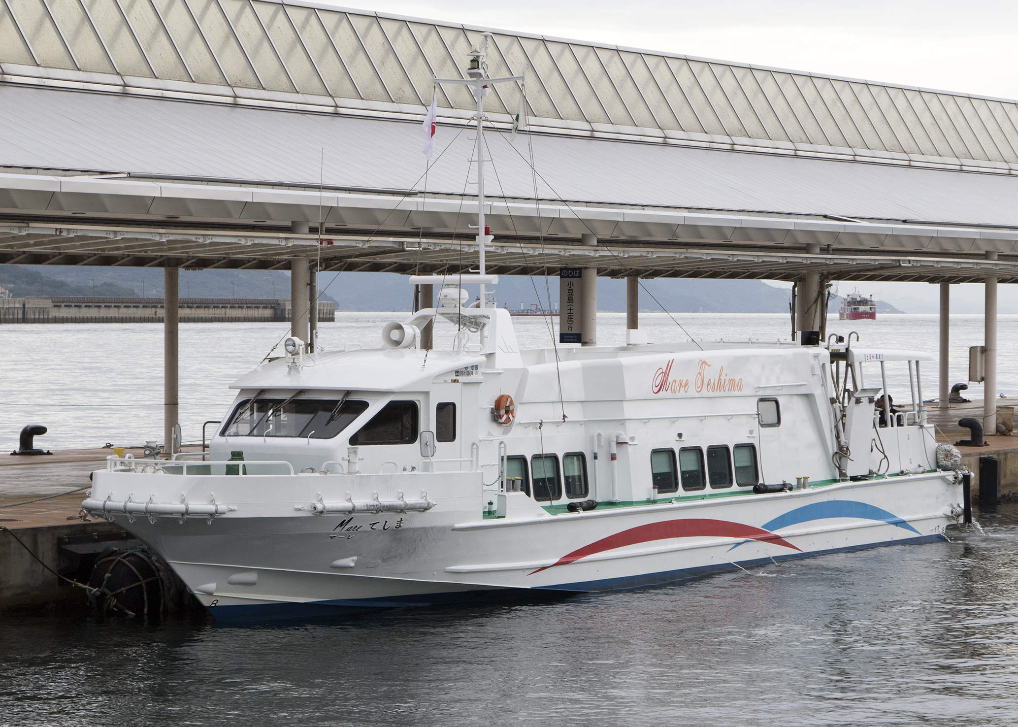 小豆島急行フェリー マーレてしま 高松港にて